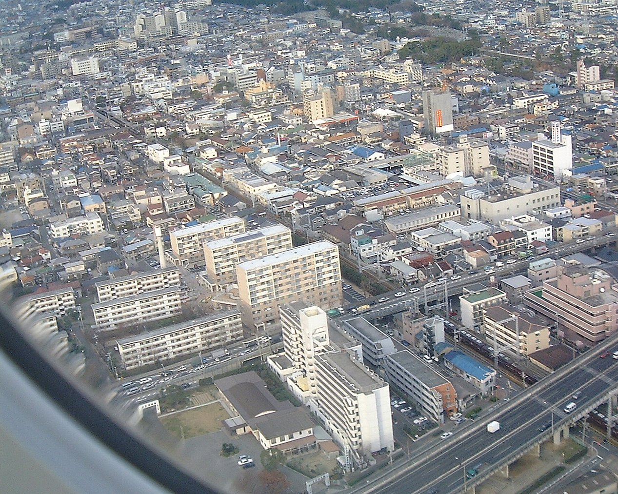 豊中市服部 大阪国際空港に着陸直前の航空機から撮影 手前から奥に向かう線路が阪急宝塚線 少し空いて東を並行するのがja:国道176号 北東の並木はja:天竺川 最も手前を横切る高架道路は名神高速道路